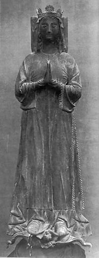 Grabskulptur Catherine de Courtenays in der ehemaligen Abtei Saint-Denis